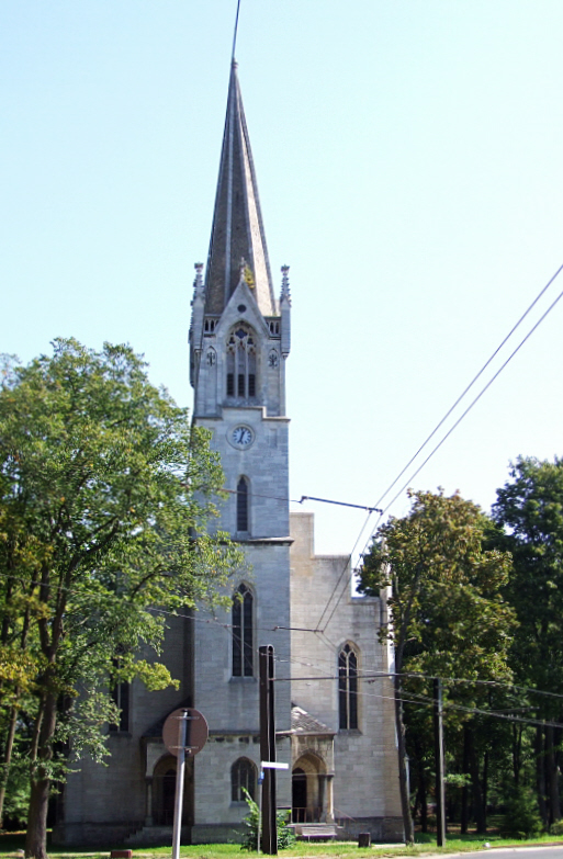 Kirche nach einem Entwurf von Friedrich August Stüler in Rüdersdorf-Kalkberge Datum: 3. Oktober 2006 Höher aufgelöste Version ist verfügbar